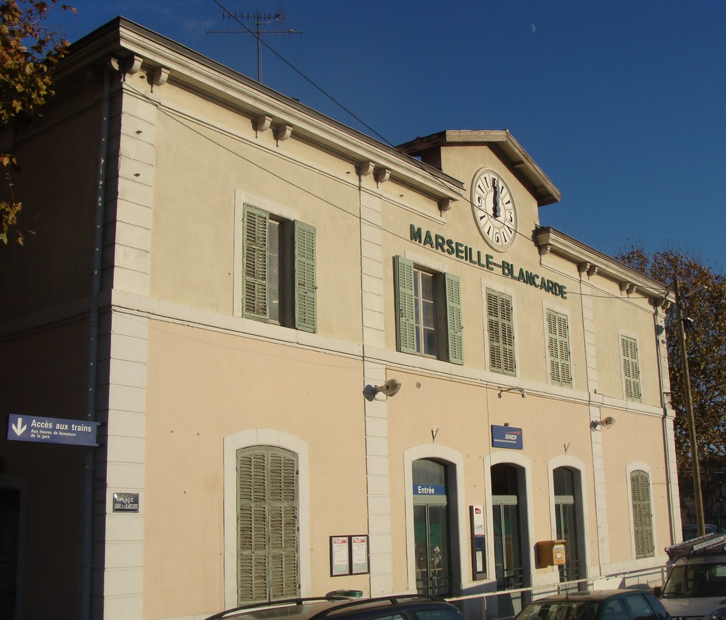 Gare de la Blancarde : la façade côté rue.